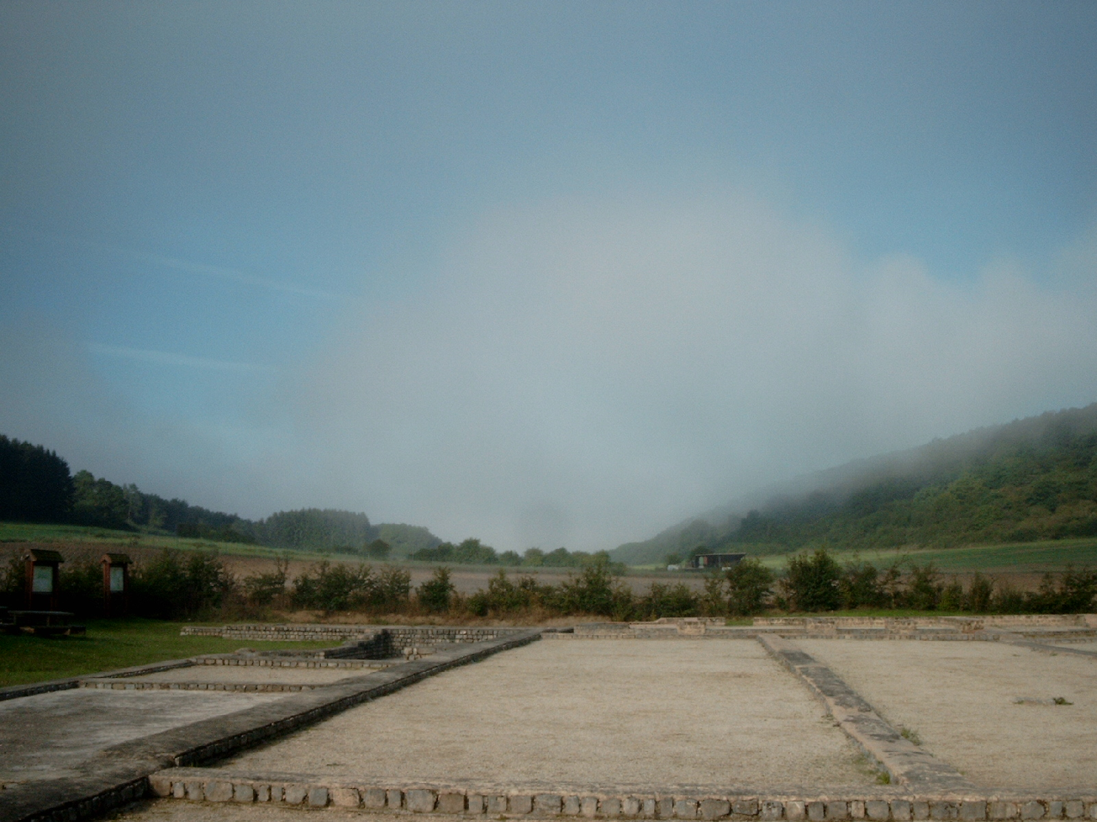 Algemeen W-zicht met funderingen basilica vooraan; linksachter het tepidarium